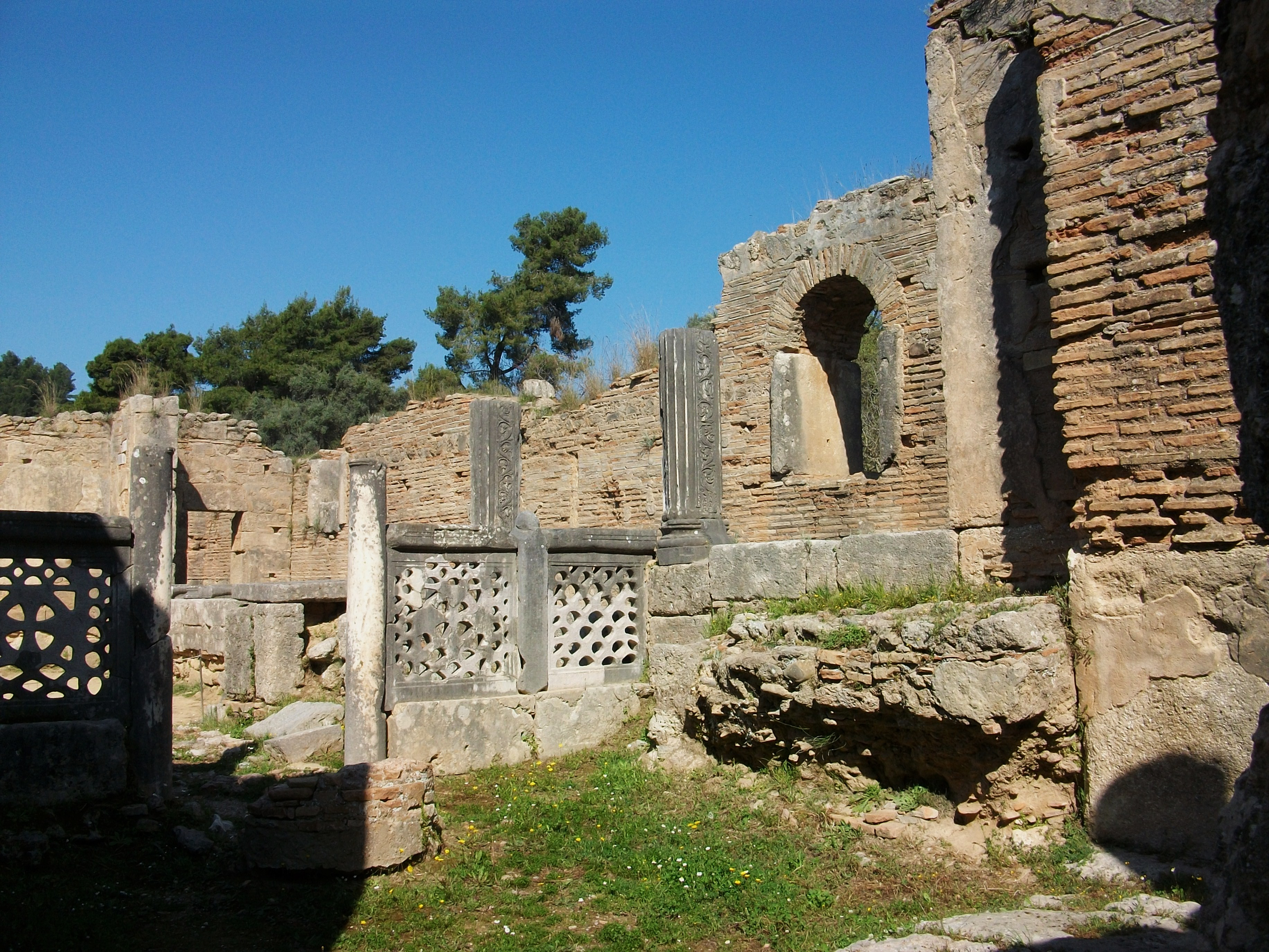 Interior del taller de Fídies a Olímpia.